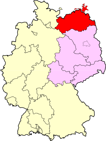 Territoires couverts par la LFV au sein de la NOFV Catégorie:Logo Fédérations Allemandes de Football